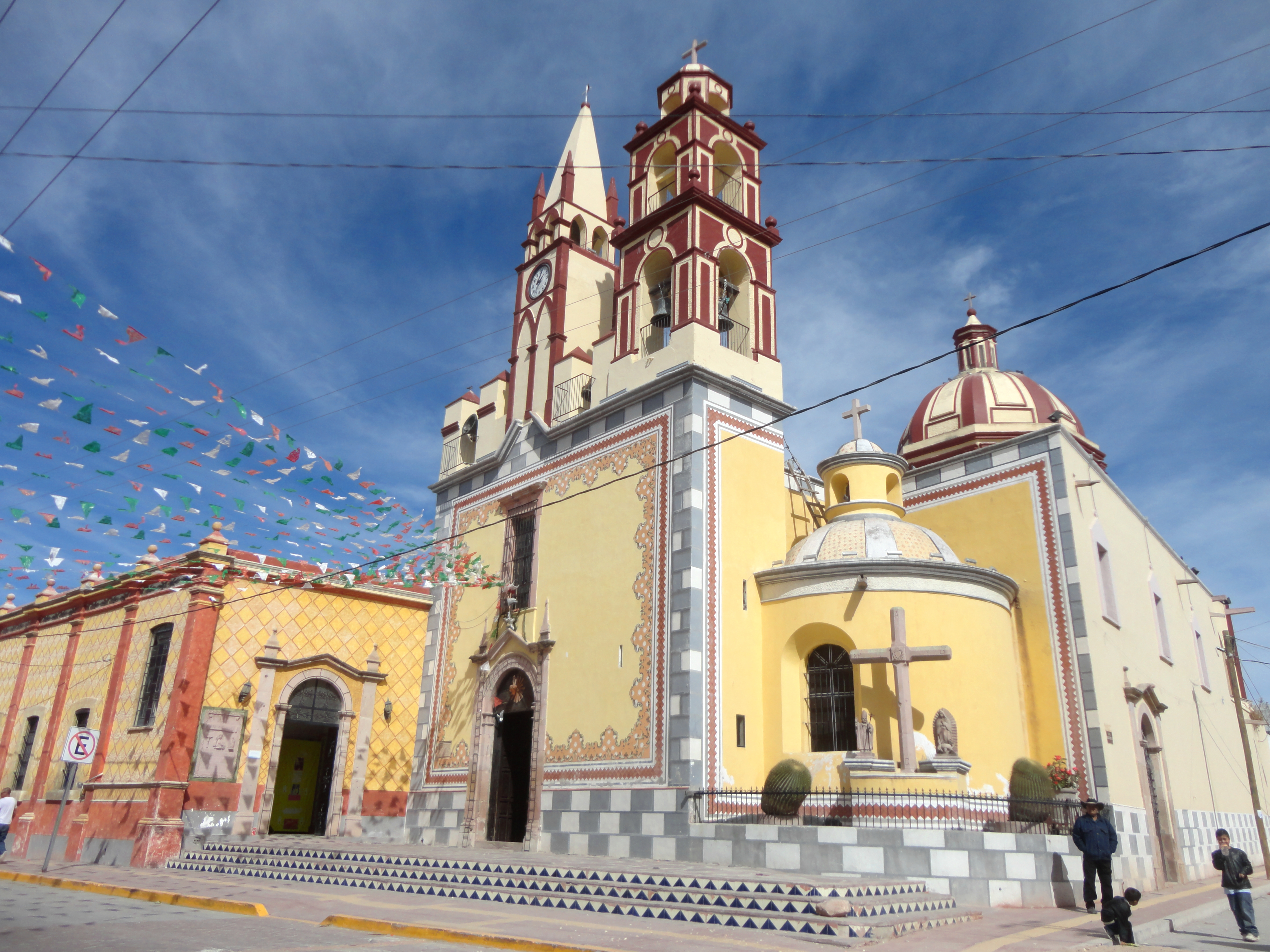 Parroquia del Divino Salvador - Doctor Mora, Guanajuato, México.